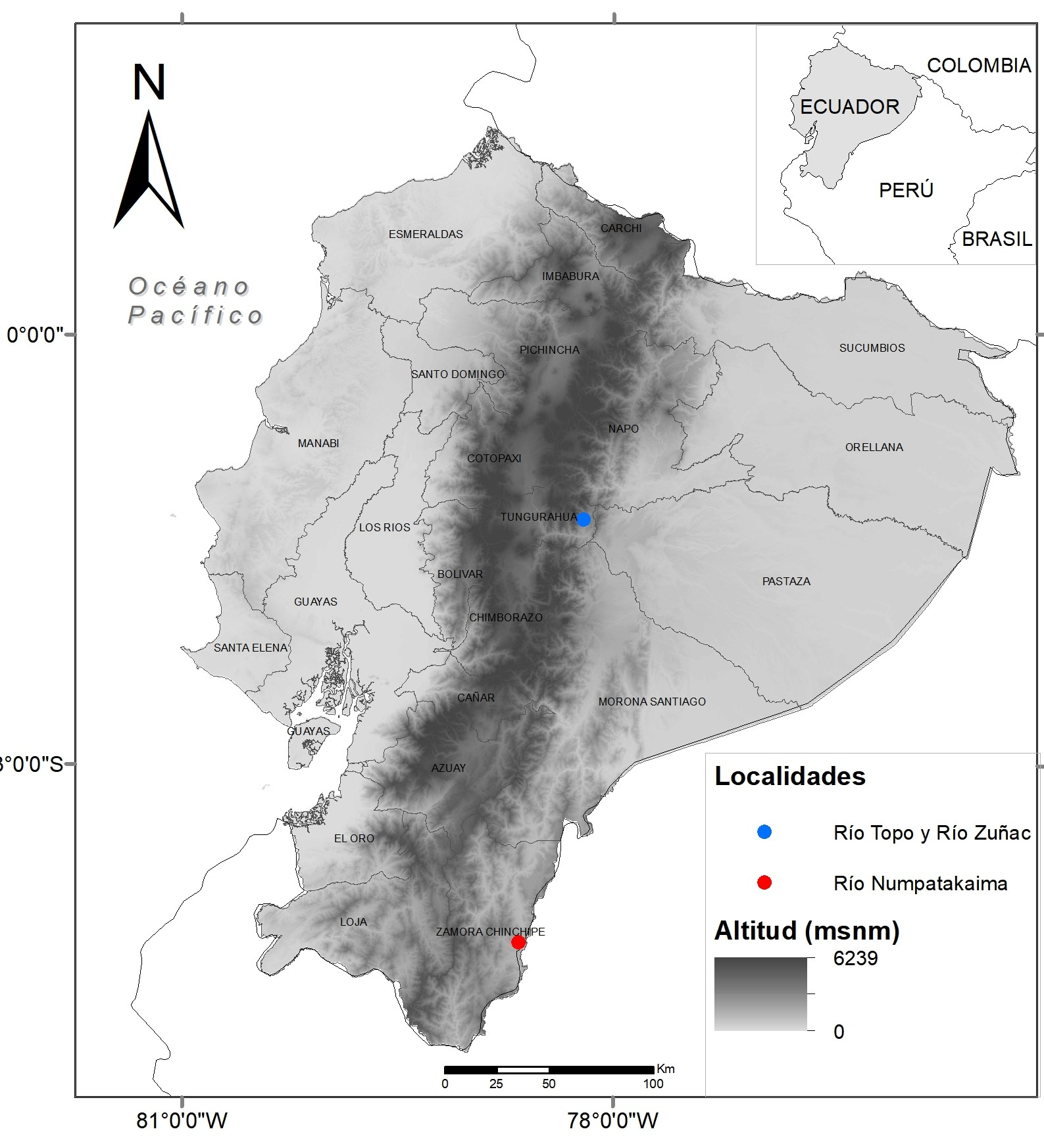 Mapa de la distribución actual de Colura irrorata en Ecuador.